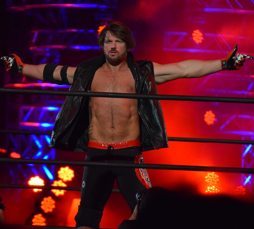 2015年8月1日 大阪府立体育会館 「G1 CLIMAX 25」 AJスタイルズ